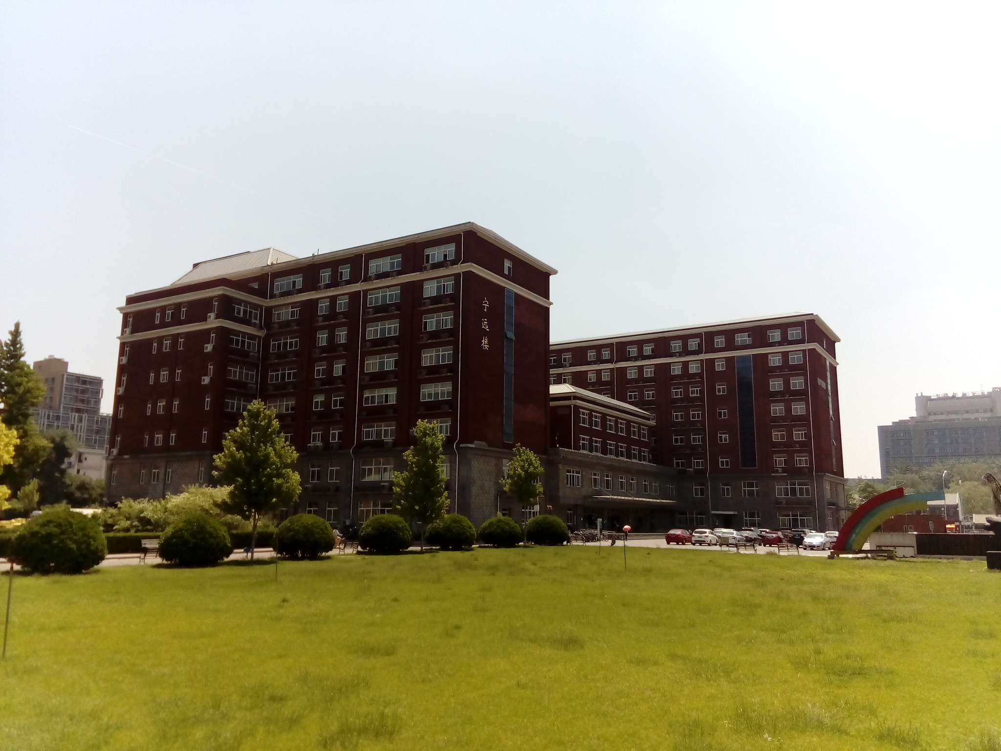 Gebäude auf dem Campus der UIBE Peking